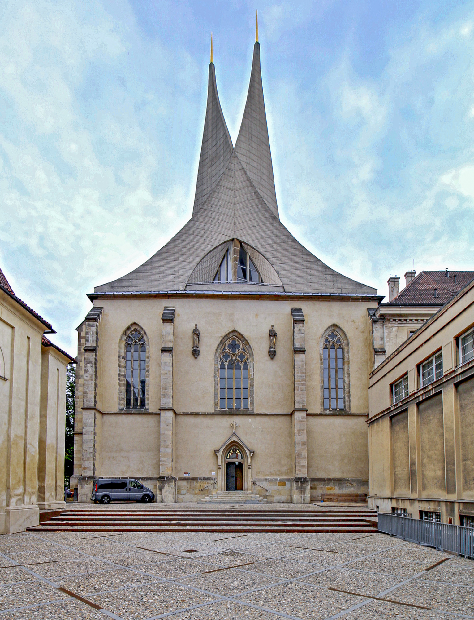 Kostel Panny Marie na Slovanech